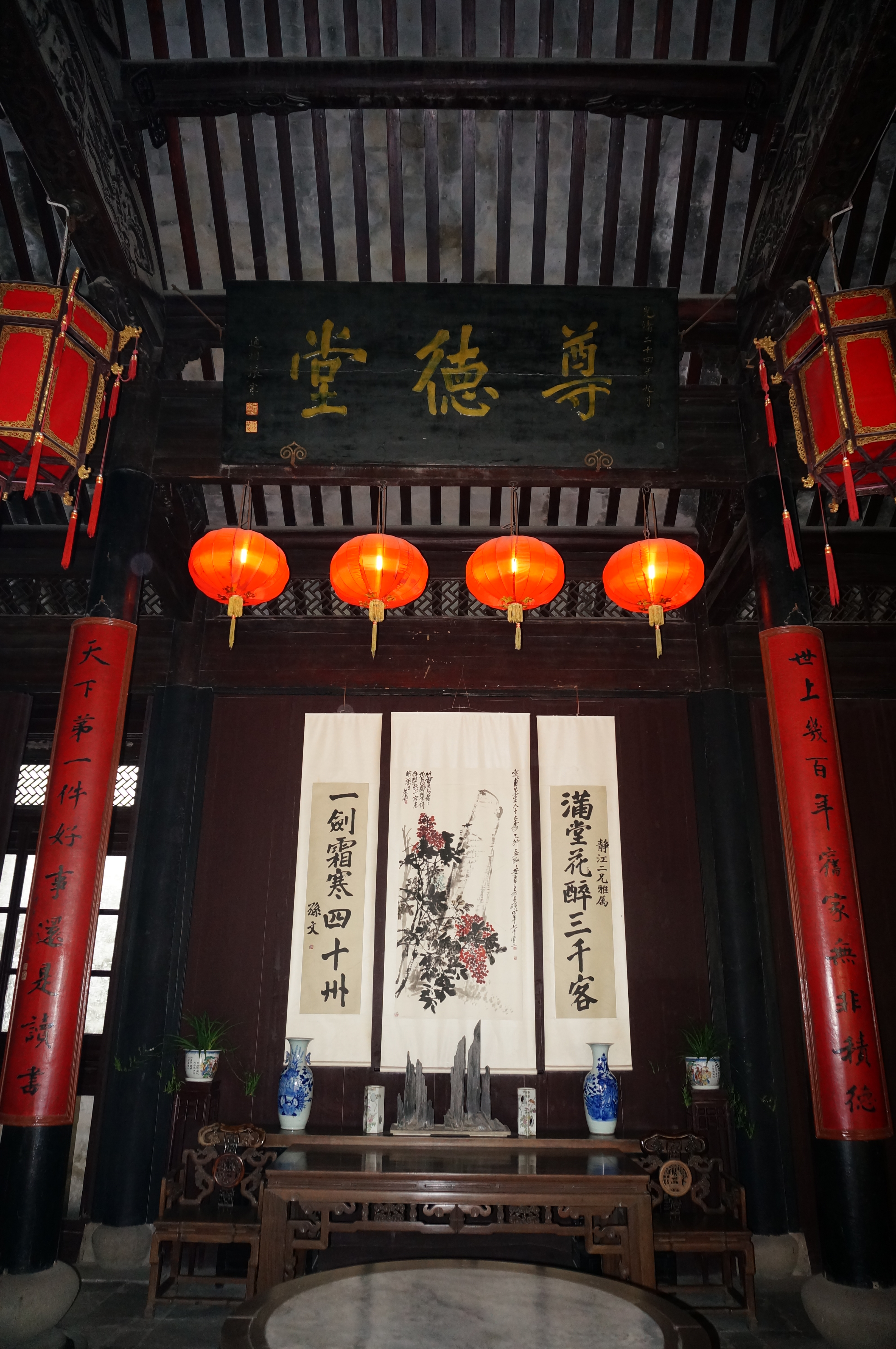 南浔张静江故居，第一进尊德堂室内。